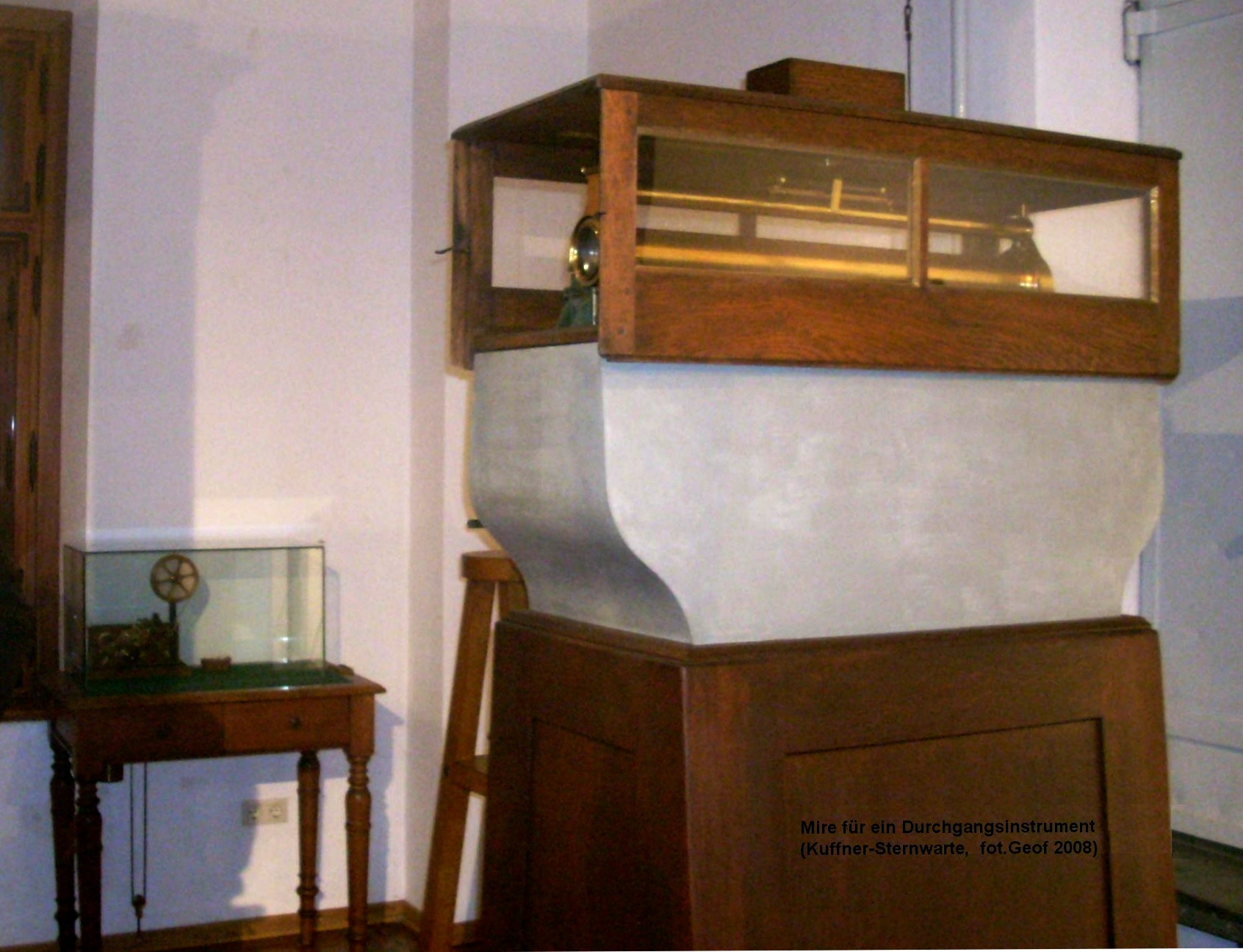 Mire zur Orientierung astronomischer Transit-Instrumente